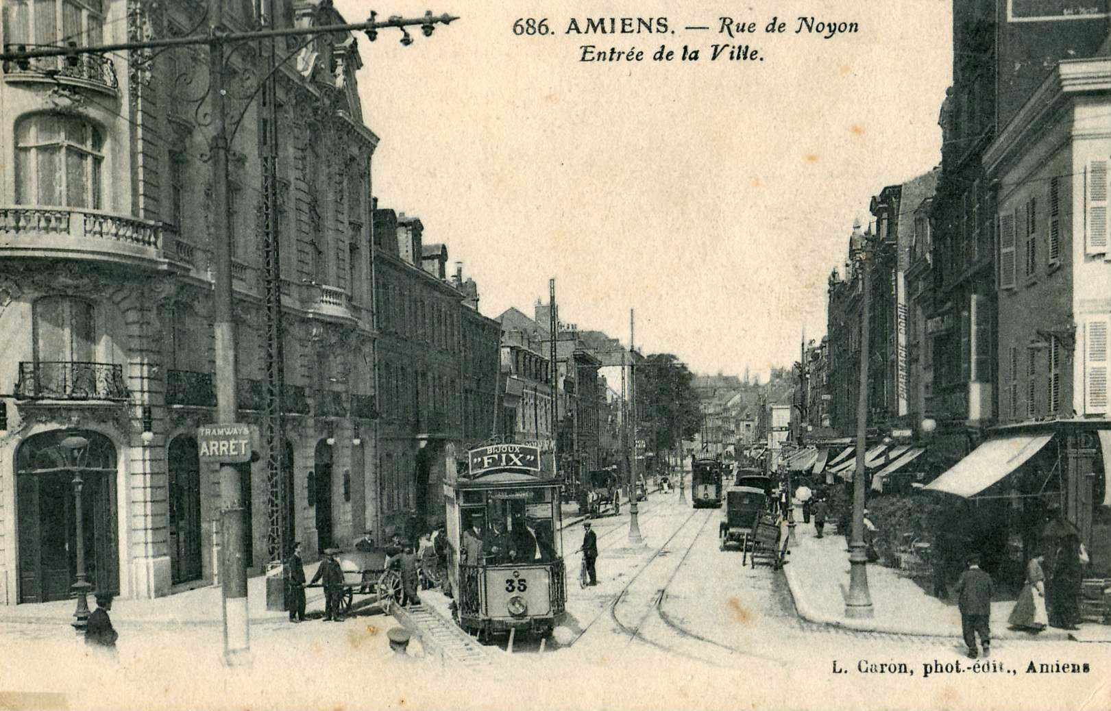 Carte postale ancienne éditée par L. Caron, phot.-édit. à Amiens : AMIENS - Rue de Noyon - Entrée de la Ville. Vue en gros plan de la motrice n°35 des tramways d'Amiens devant un de ses arrêts (voir la plaque arrêt fixée sur le poteau supportant la ligne aérienne de contact. La motrice de la ligne 4, vue au carrefour Rue de Noyon / Boulevard d'Alsace-Lorraine, approche de son terminus de la Gare du Nord, après avoir croisé une autre motrice sur le tronc commun des lignes 1, 4, 4bis et 7